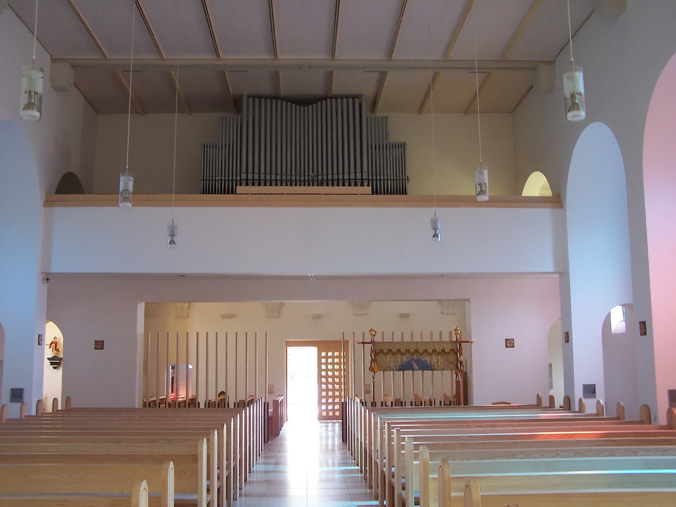 Wörth an der Isar. Landshuter Straße 55. Katholische Pfarrkirche St. Laurentius. Im südlichen Landhaus Orgelempore mit gerader Brüstung.